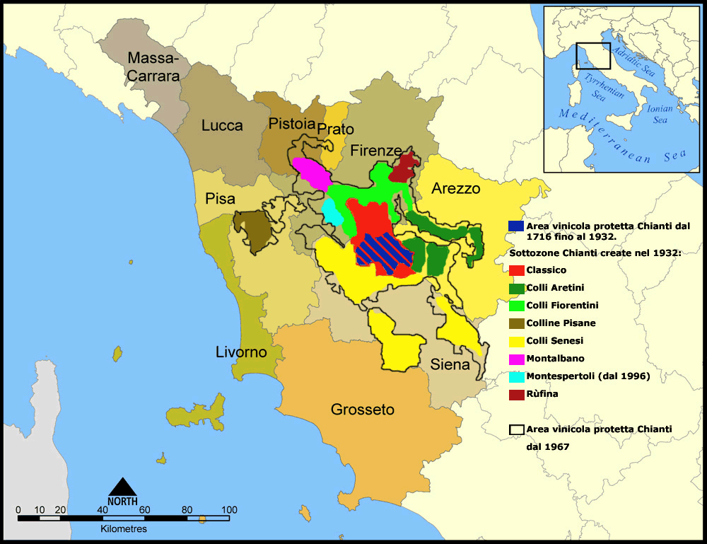 Chianti sub-zones